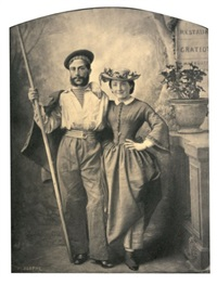 Marie-Alexandre (Menut) Alophe. Fantaisies photographiques